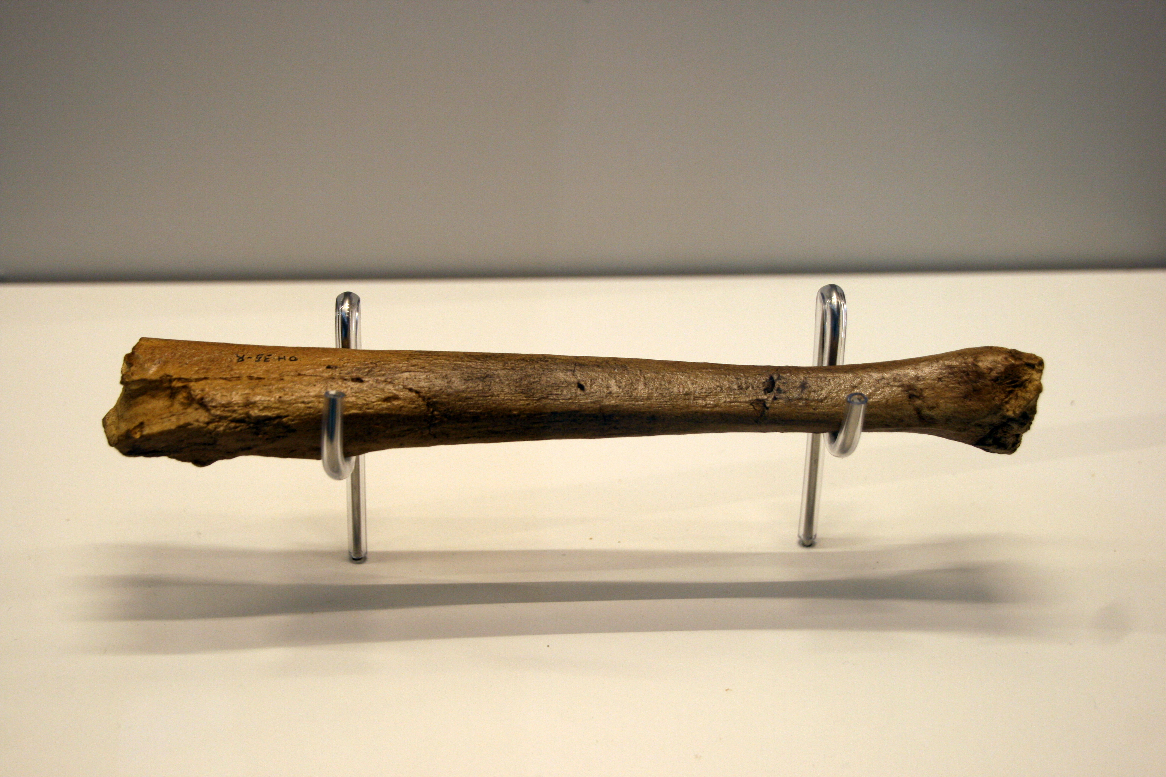 Tibia de Homo habilis, OH 35. Réplica Original: FLK Zinj, Garganta de Olduvai (Tanzania) 1,8 millones de años Museo Nacional de Dar Es Salaam, Tanzania Réplica: Instituto de Evolución en África Exhibido en exposición temporal, "La cuna de la humanidad", en el Museo Arqueológico de Regional de Madrid